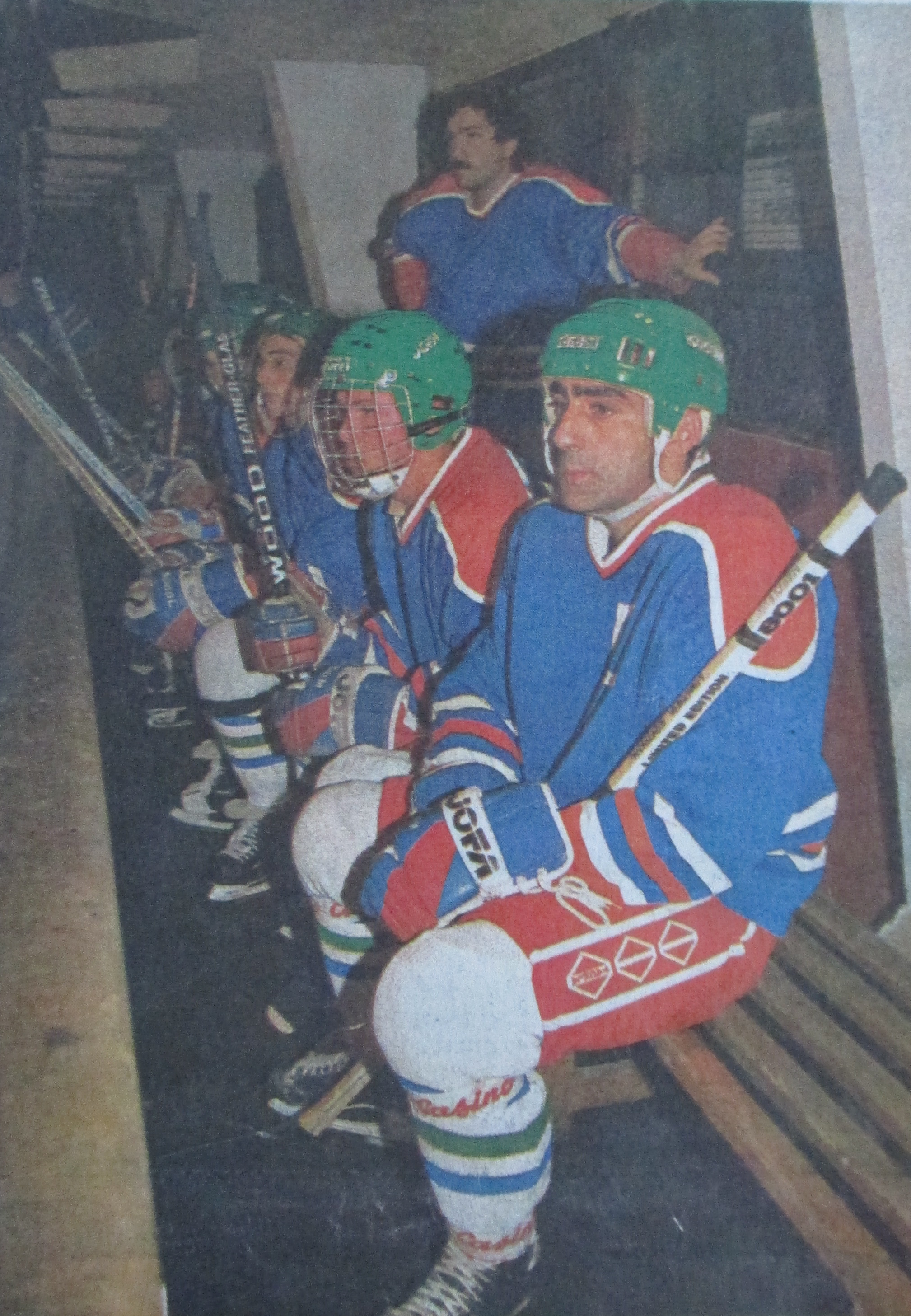 Photo du banc de l'équipe spinalienne de hockey saison 1991-1992 avec Raphaël Marciano au premier plan